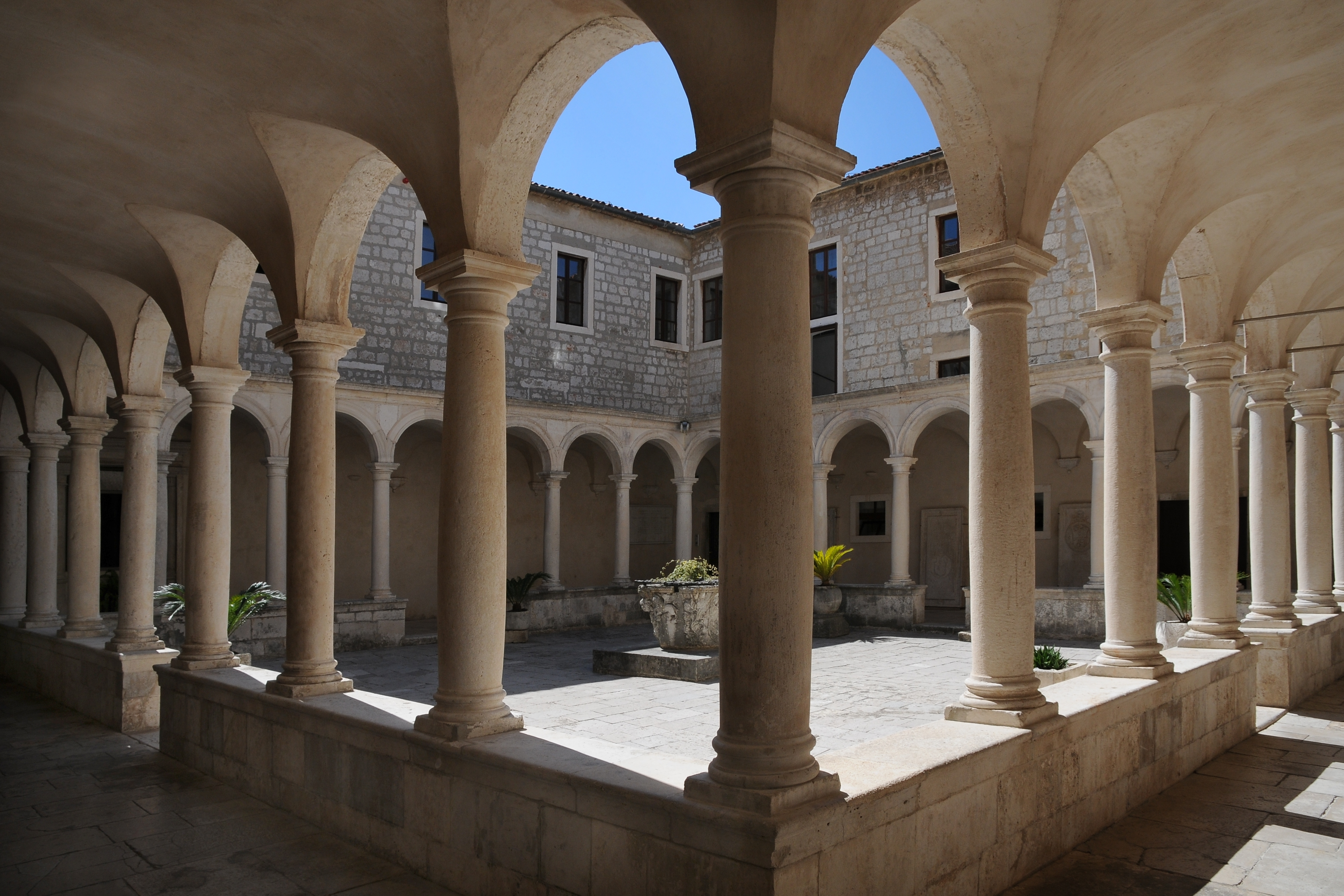 Franz von Assisi Kloster in der Altstadt von Zadar.